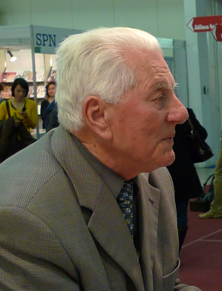 Ladislav Ťažký (1924 - 2011)